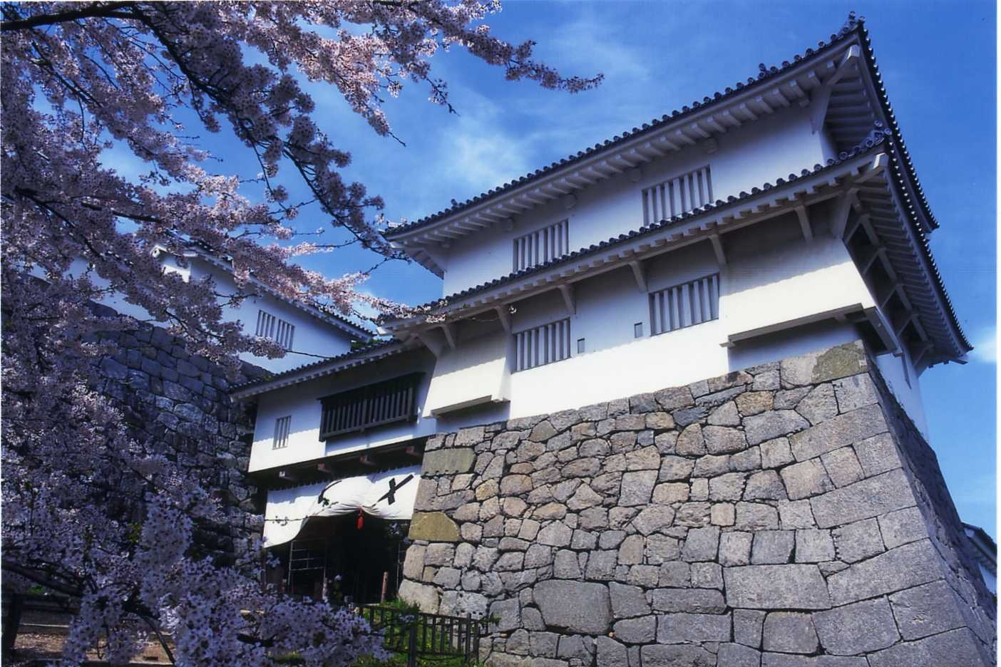 福島県立霞ヶ城公園